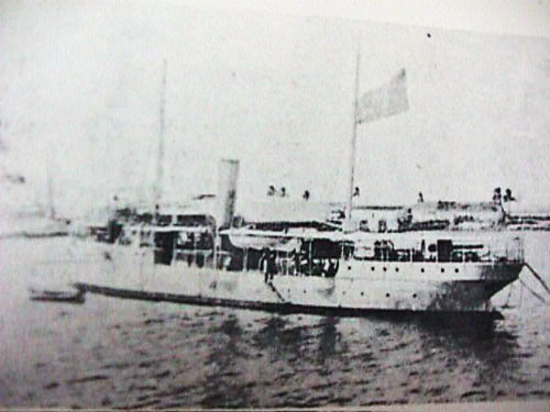 Fotografía de la Embarcación Mexicana "Pontón Chetumal"